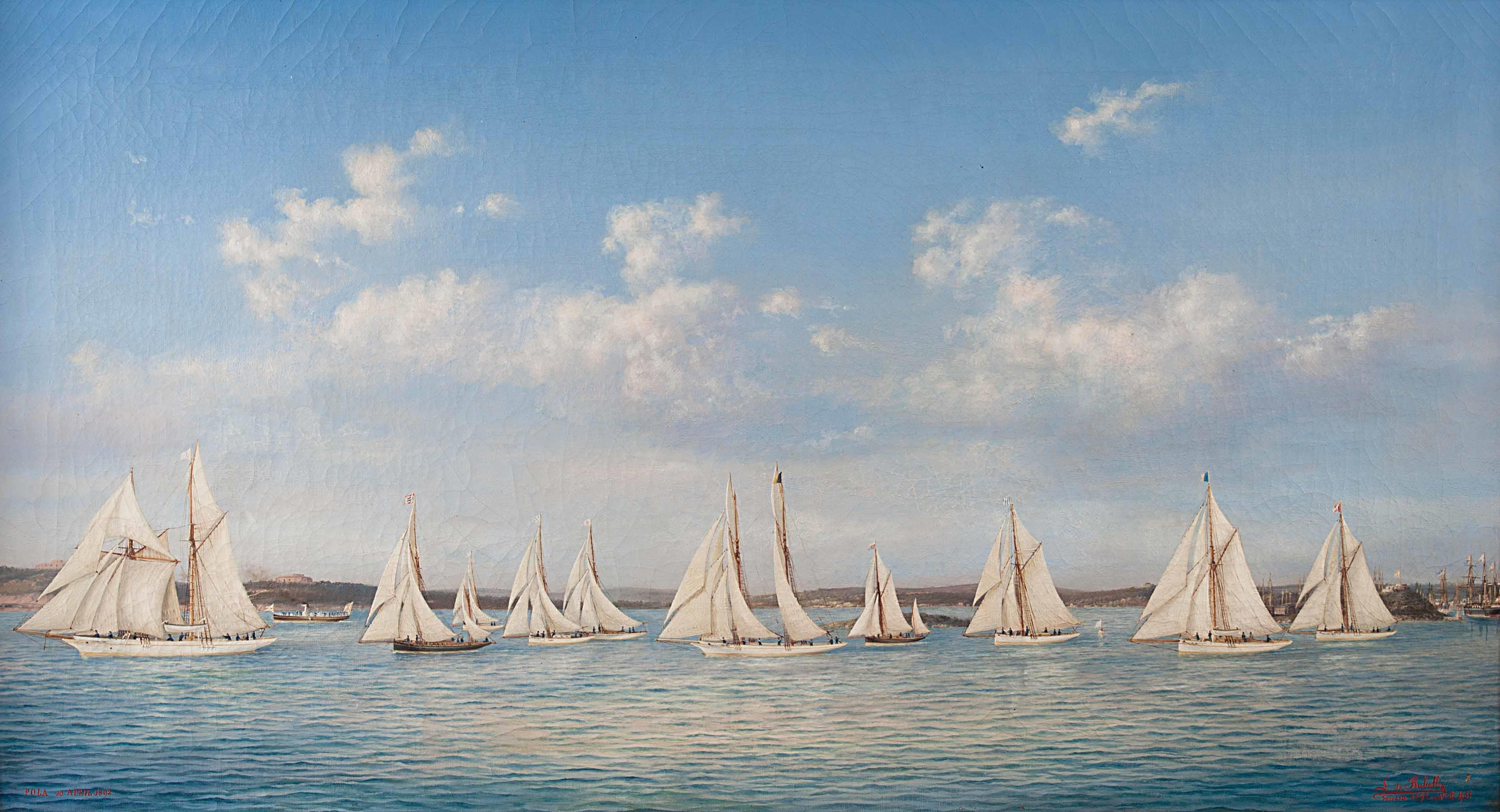 Segelregatta vor Pula